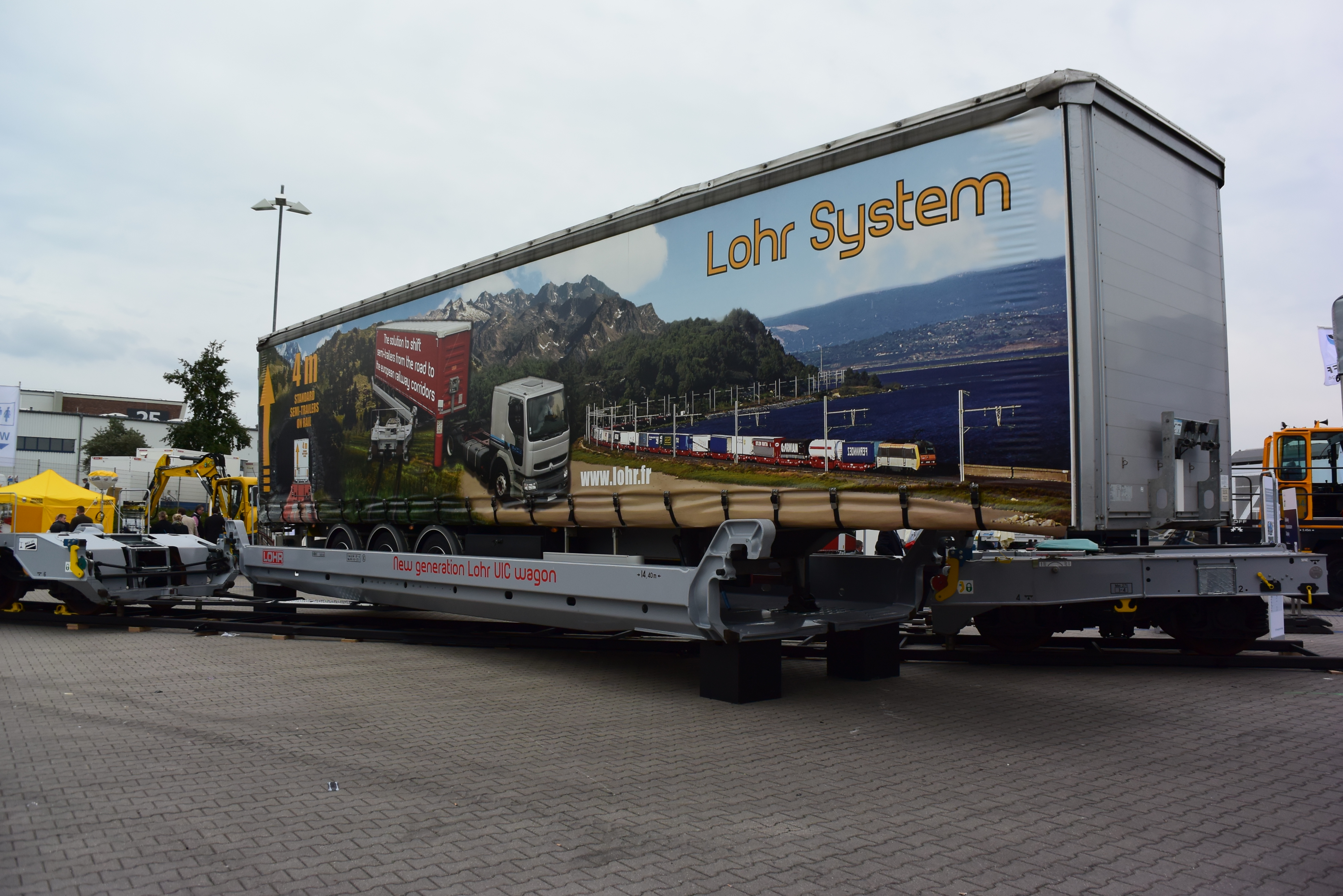 Lohr UIC wagon podczas InnoTrans 2014